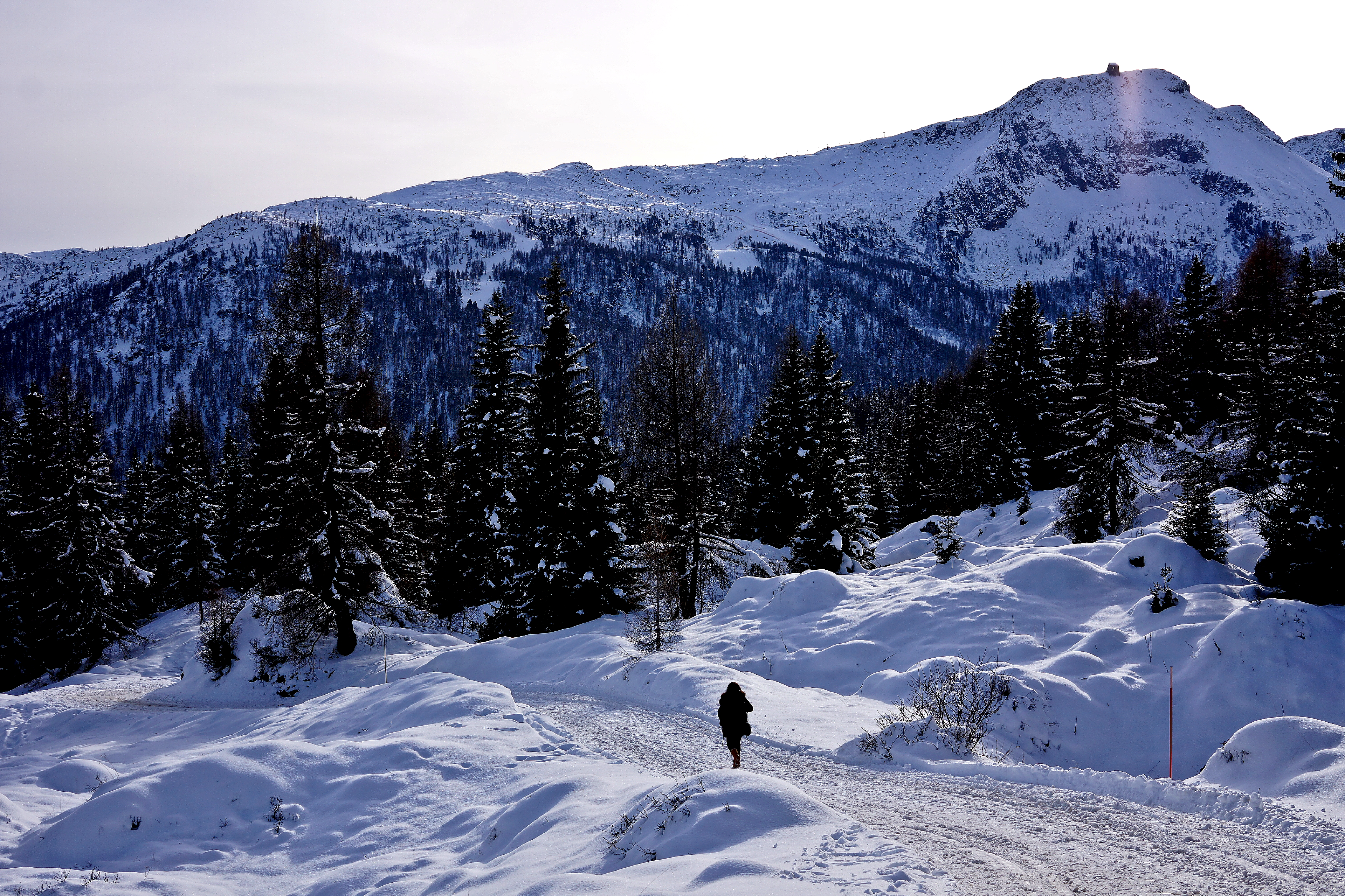 Fuchiade